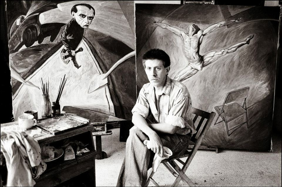 Jorge Velarde workshop